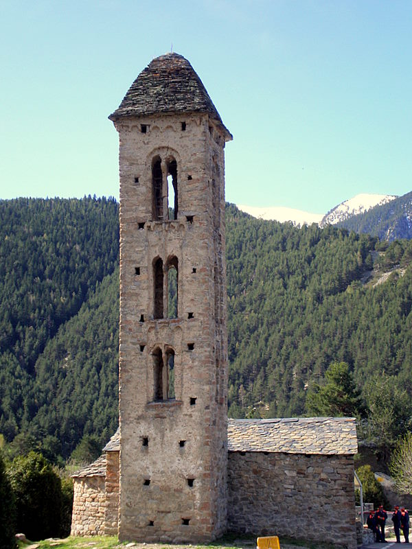 Sant Miquel d´Engolasters